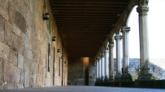 Castelo de Monterrei, Monterrei, Ourense, Pazo das Damas